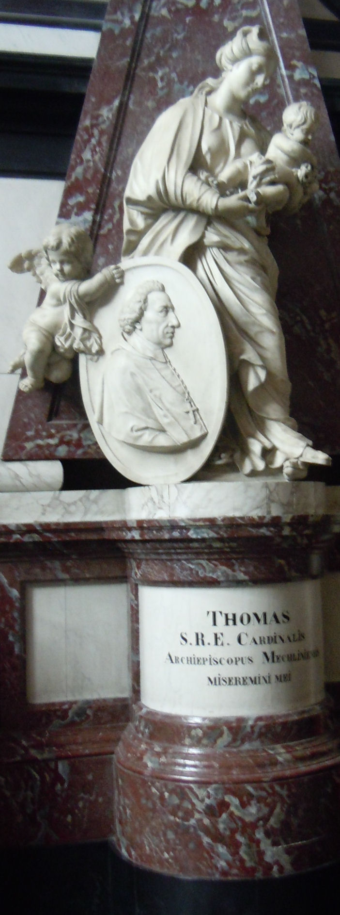 Tombes Kathedraal